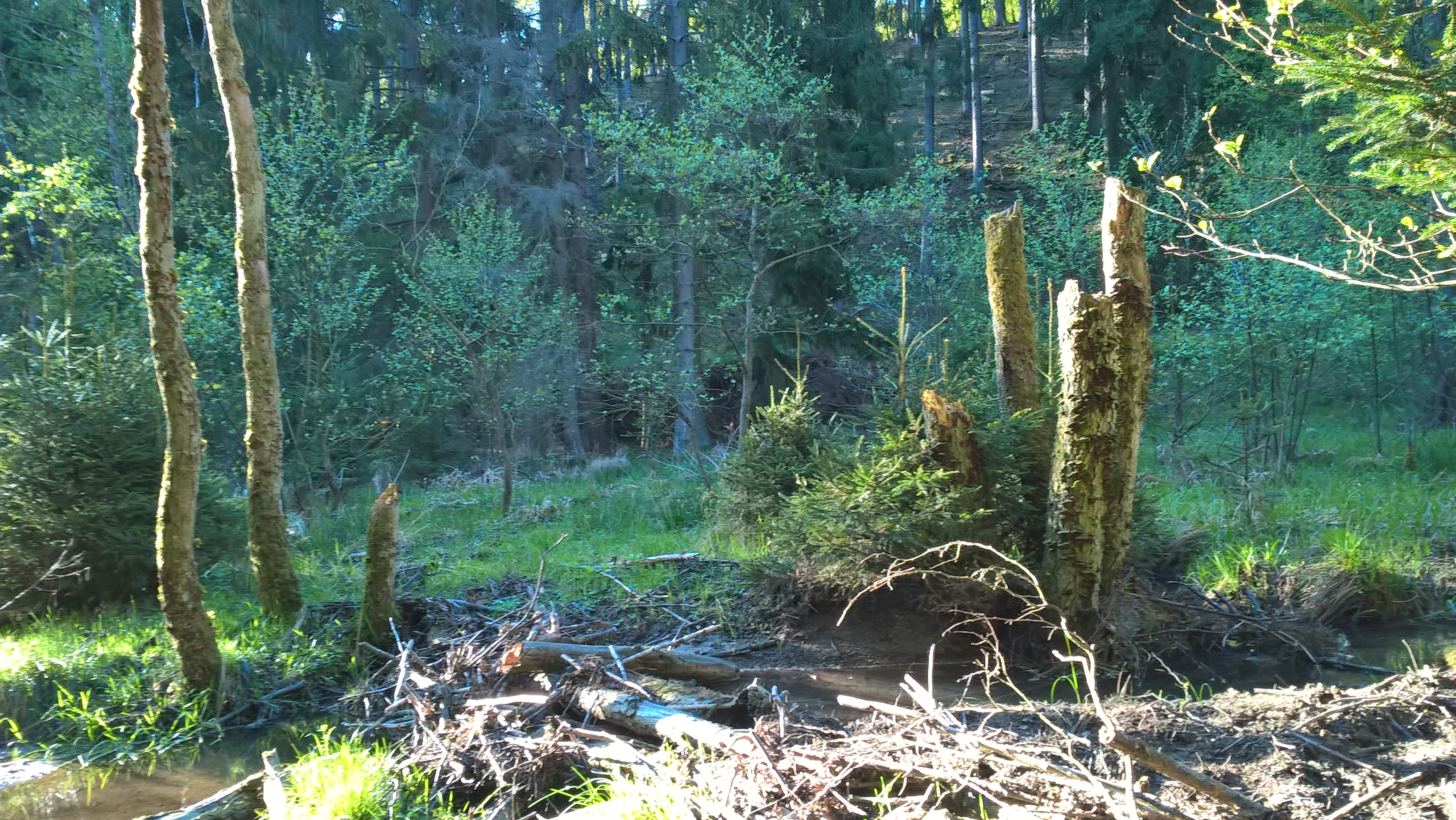 Die unberührte Natur im früheren Dorf Wiebelhausen (bei Gilsbach), welches im 15. Jahrhundert durch einen Brand vollständig ausgelöscht wurde. Seit diesem Zeitpunkt hat die Natur das ehemalige Dorfgebiet komplett überwuchert und keine Spuren menschlicher Zivilisation übrig gelassen.